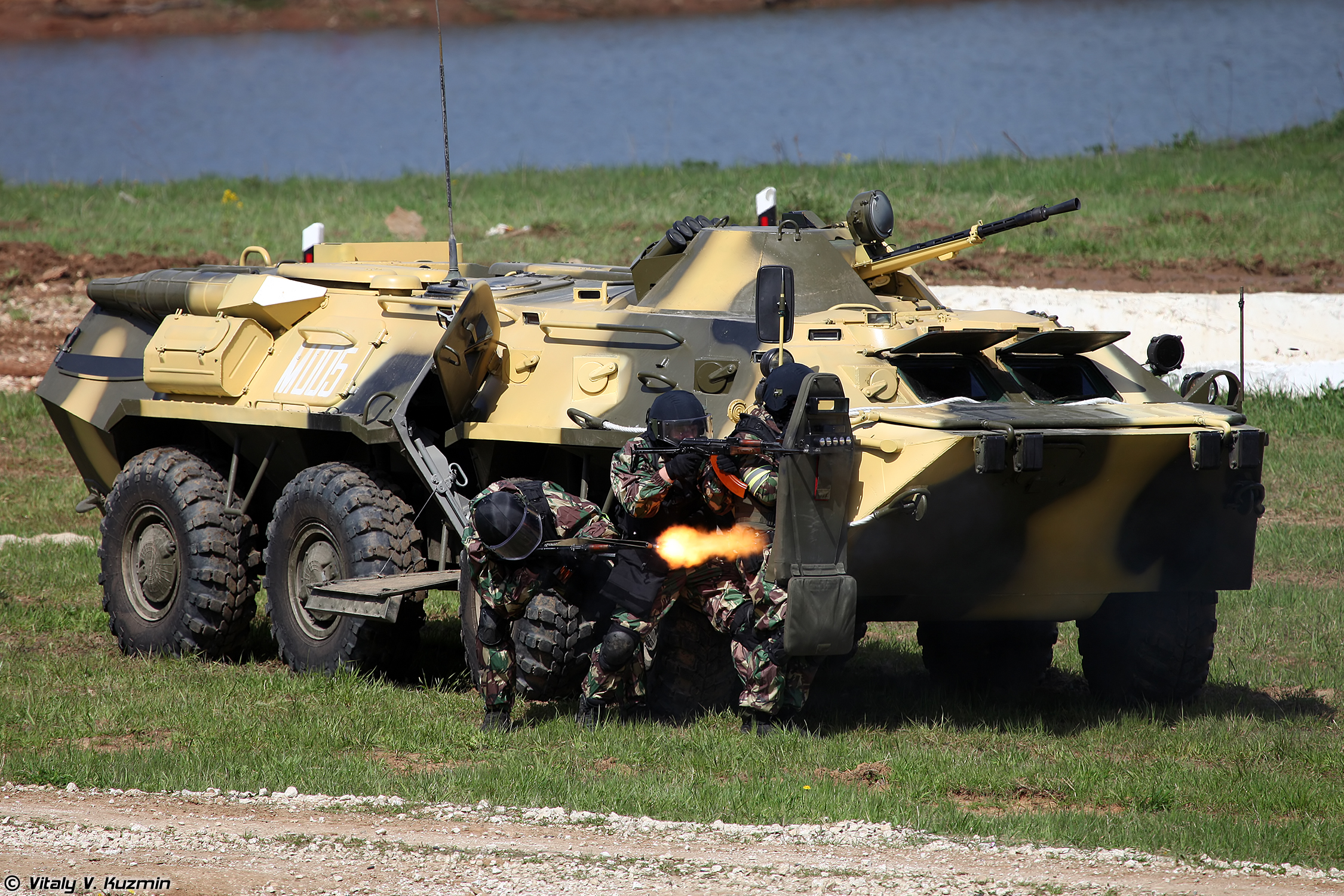 Сотрудники Московского ОМОН проводят операцию по уничтожению бандгруппы в здании (Moscow OMON operators assault a building with suspects)